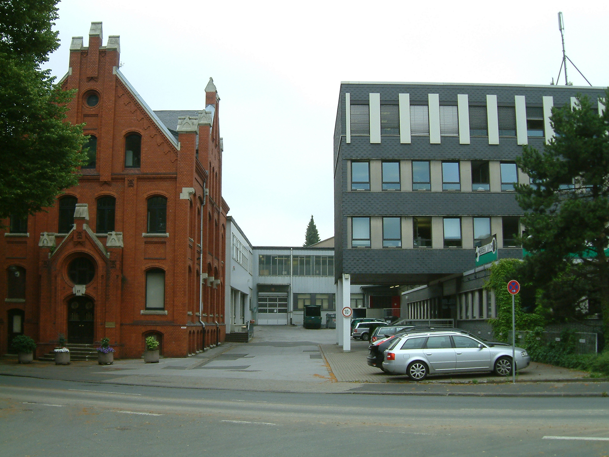 Stahlwille, Hauptgebäude alt (links) und neu an der Lindenallee in Wuppertal-Cronenberg